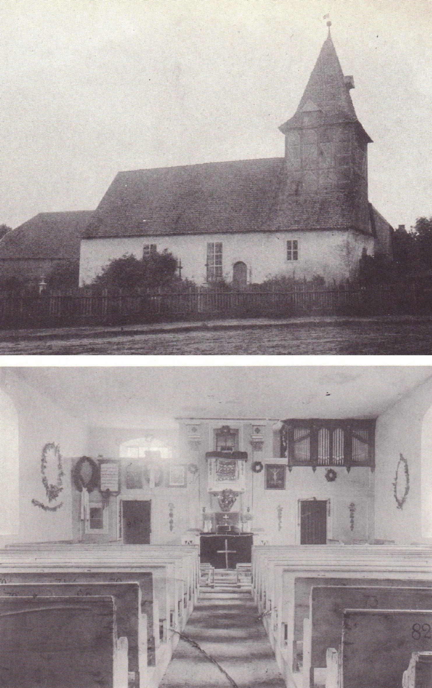 Duttenstedt (Stadt Peine), alte Dorfkirche (erbaut 1677, abgerissen 1897), Äußeres von Norden, Inneres nach Osten